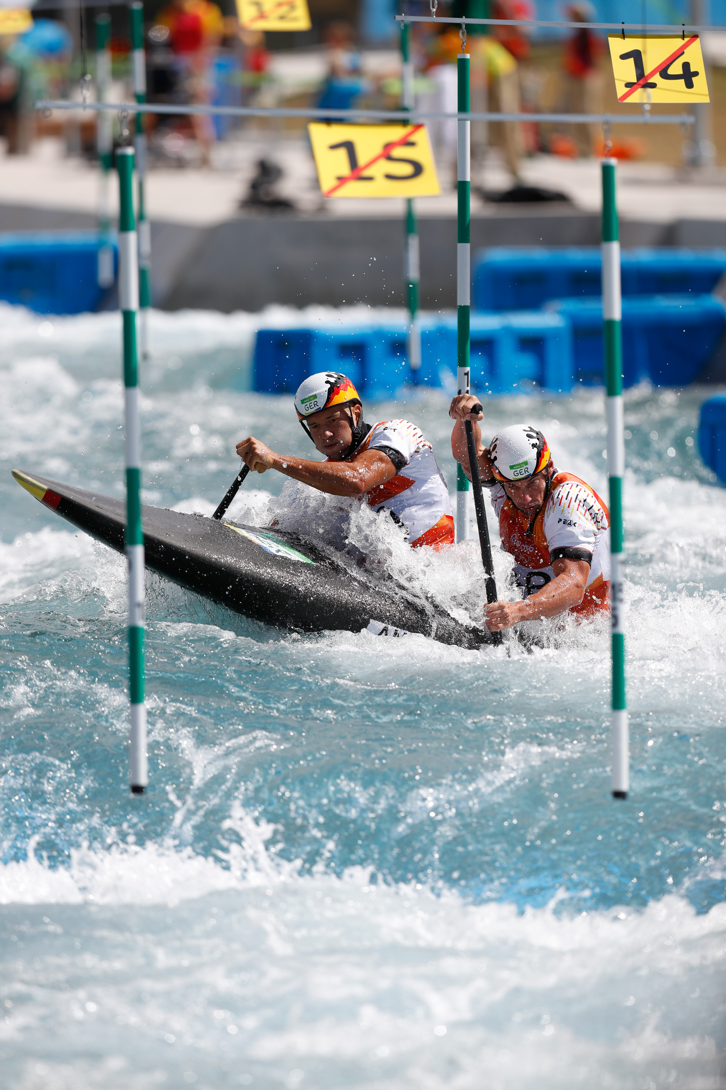 Rio de Janeiro - Alemães Franz Anton e Jan Benzien disputam canoagem slalom categoria C2 nos Jogos Olímpicos Rio 2016 , no X Park em Deodoro. (Fernando Frazão/Agência Brasil)